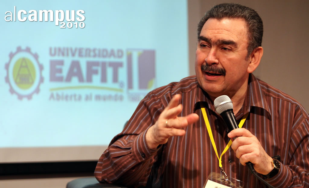 EAFIT - Alcampus Académico Conferencia Boom Minero y Petrolero en Colombia - Javier Genaro Gutiérrez Pemberthy, presidente de Ecopetrol